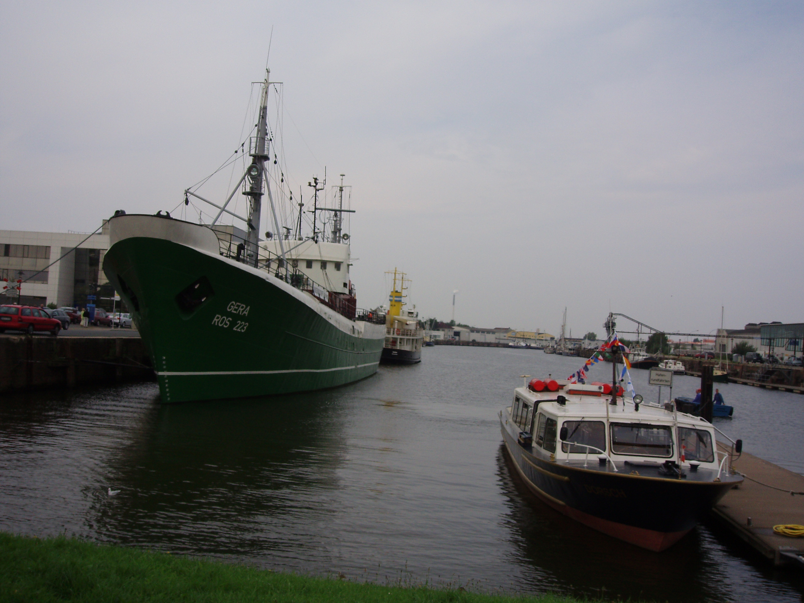 Fischereihafen Bremerhaven mit dem Museums-Fischdampfer "Gera"